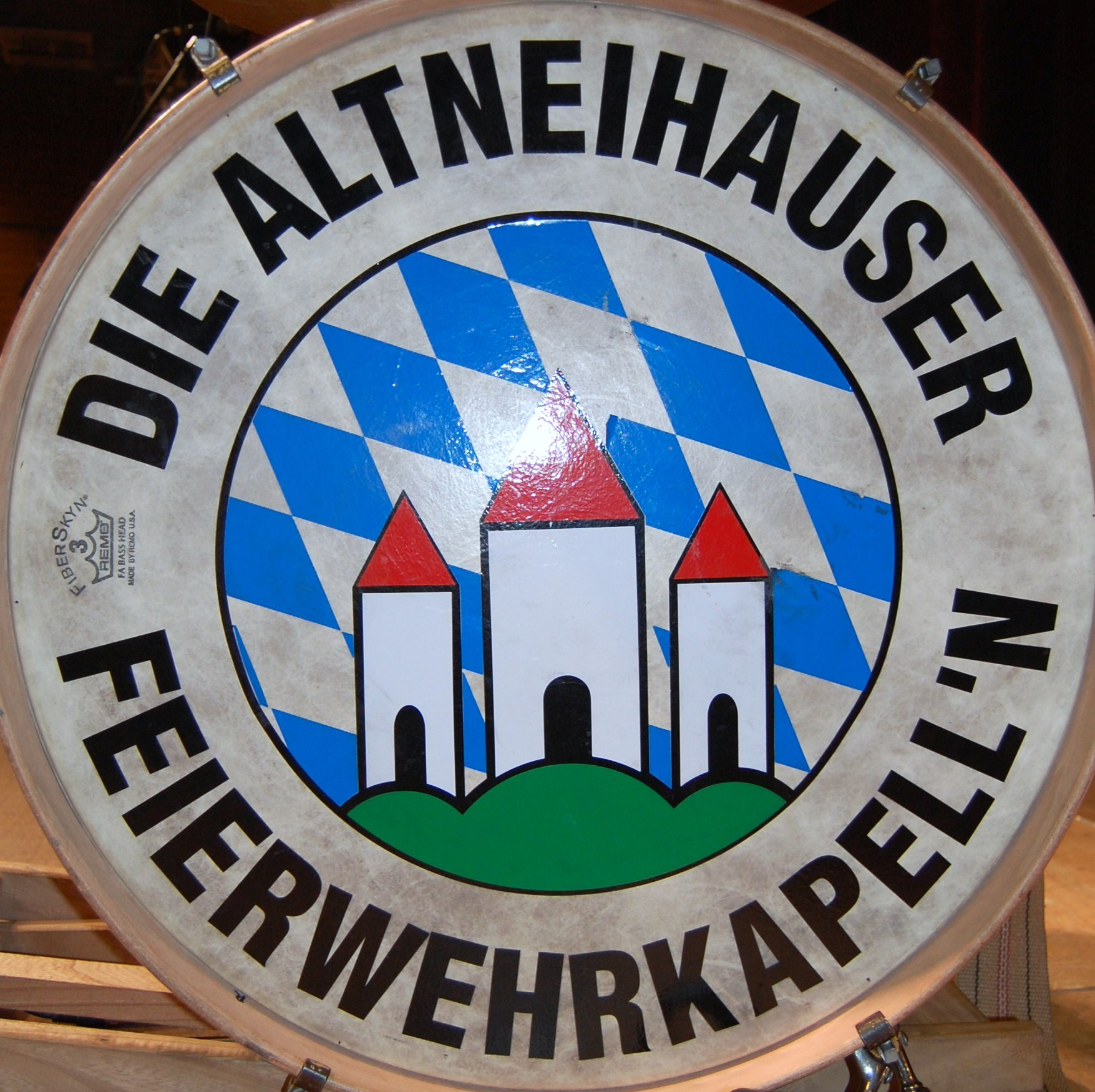 Logo der "Altneihauser Feierwehrkapell'n" auf der großen Trommel